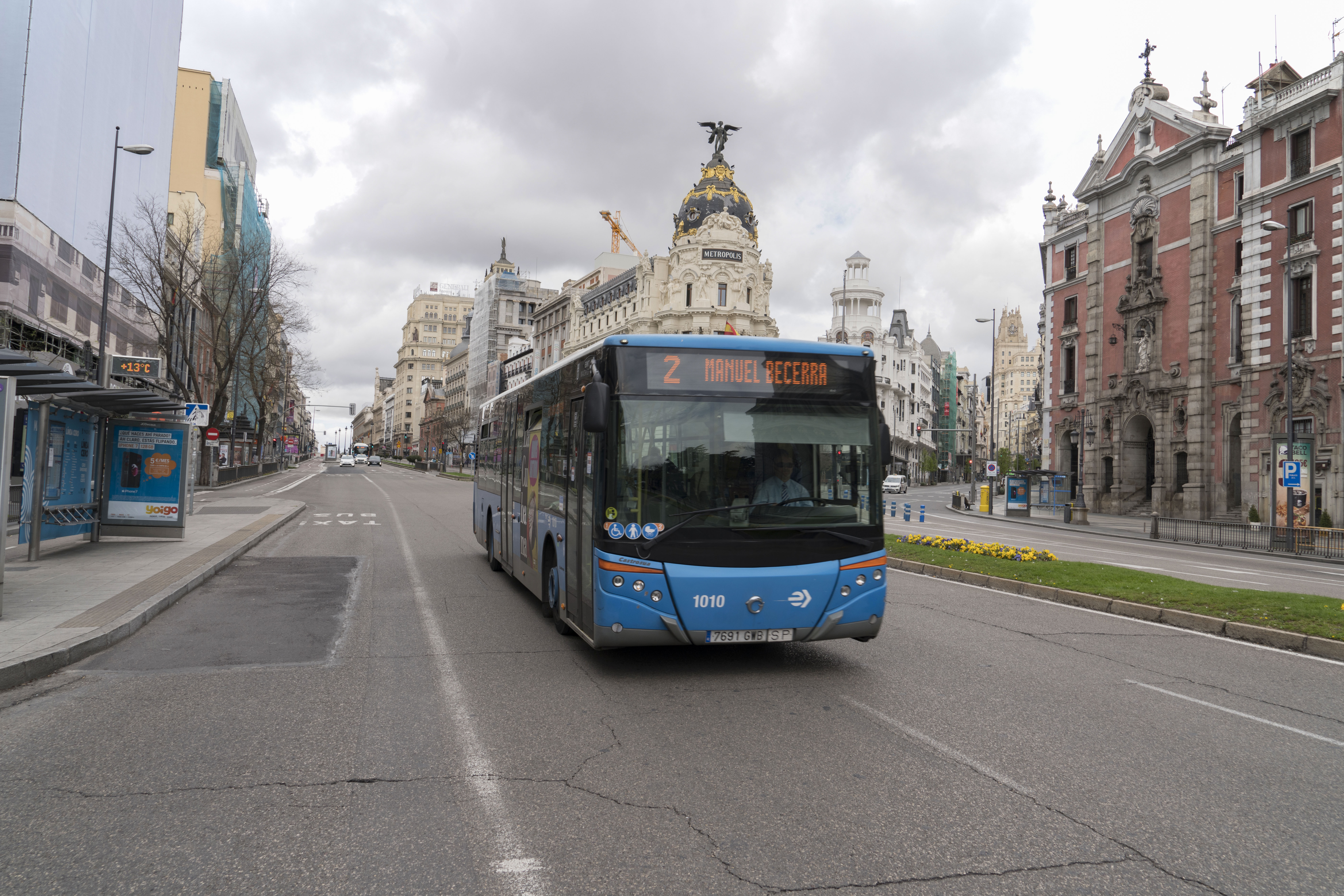 Calle de Alcalá, Madrid, 22 de marzo, una semana de cuarentena.